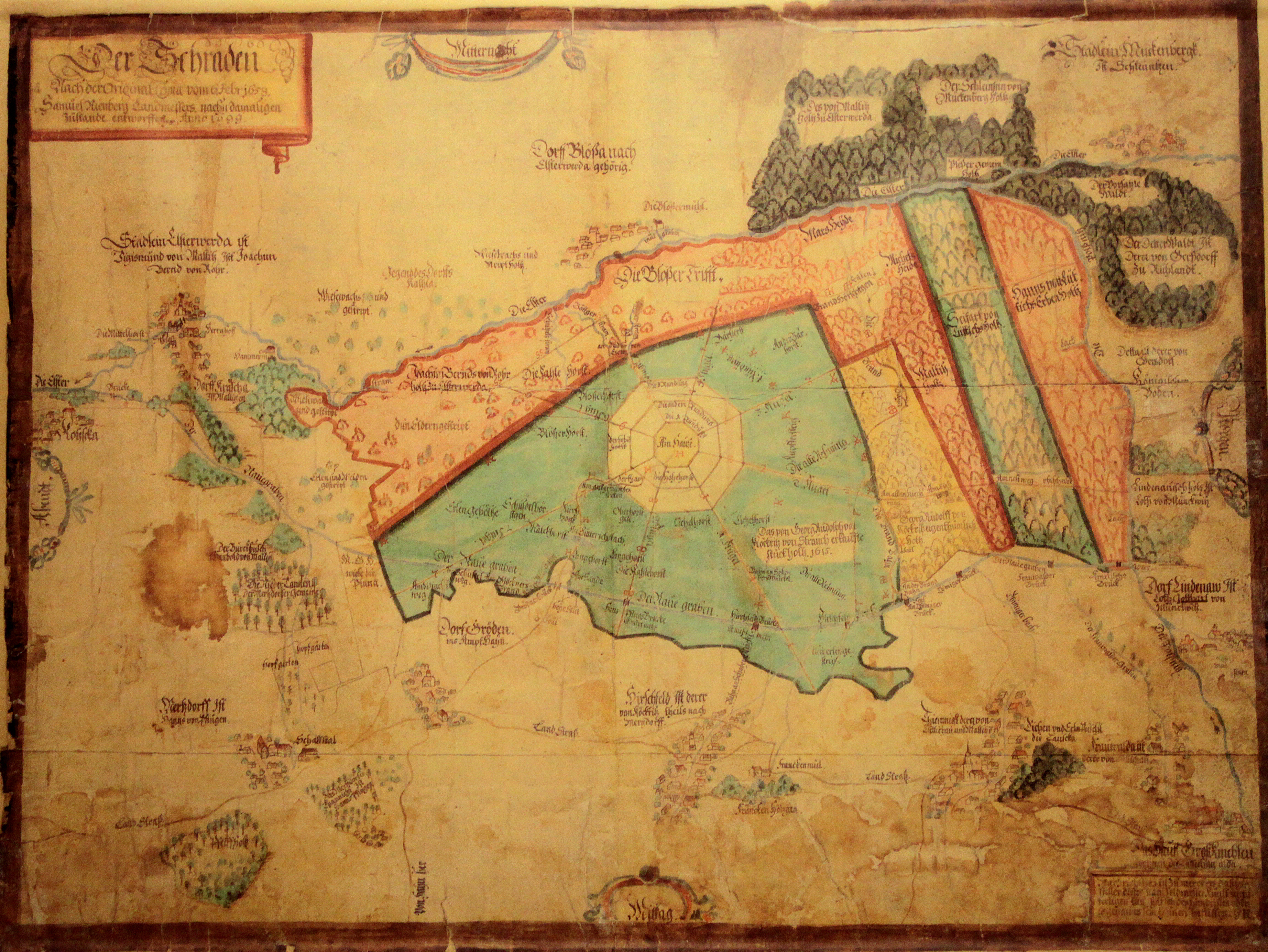 Eine Karte des Schradens von 1658.